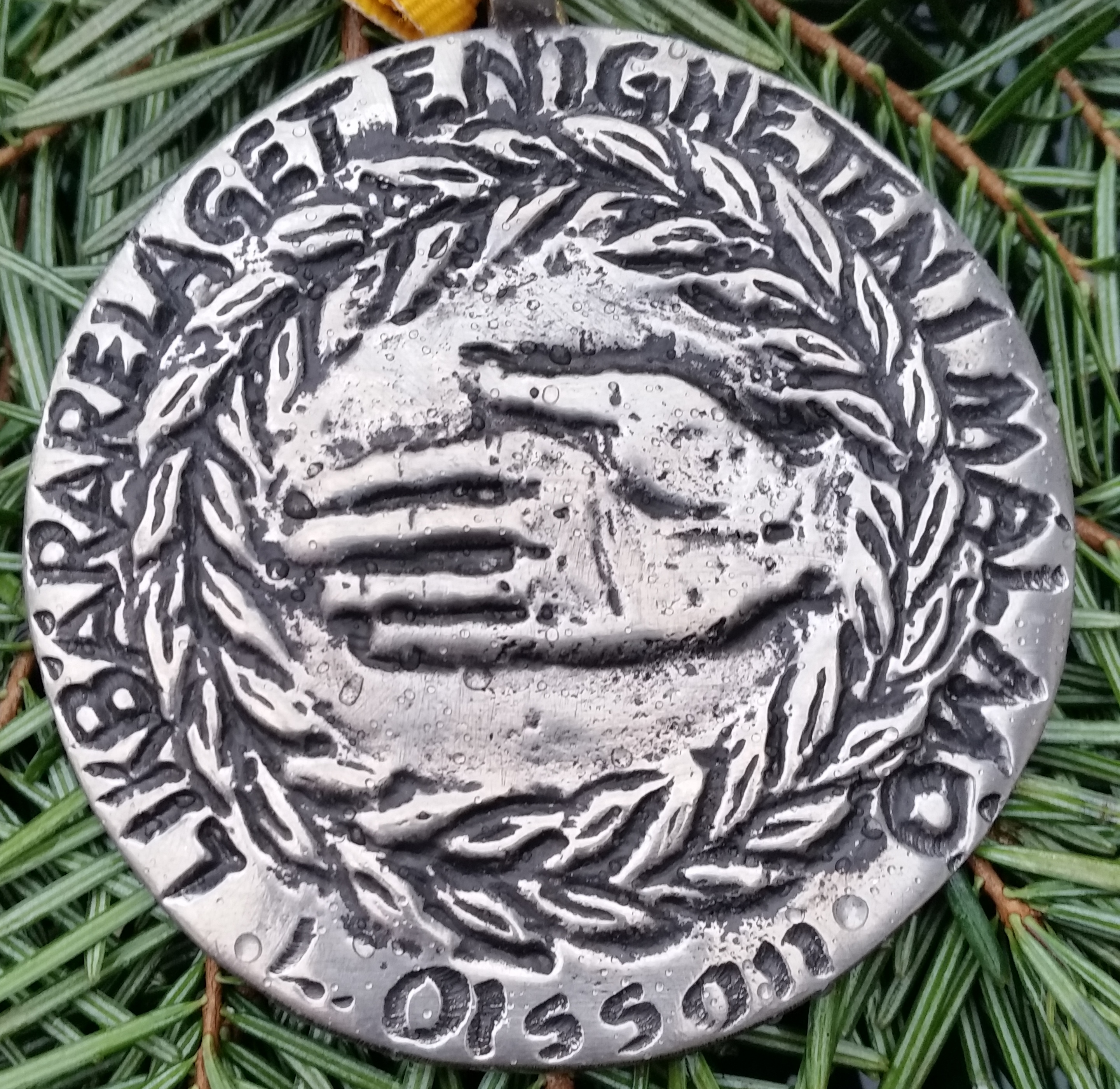 Likbärarlaget Enighetens symbol